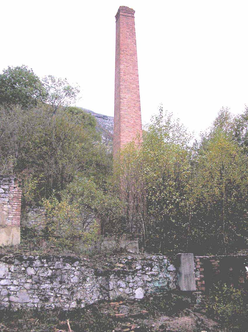 Lavadero de mineral de cobre en las minas de Rioseco (Texeo) en el concejo de Riosa, Asturias, España